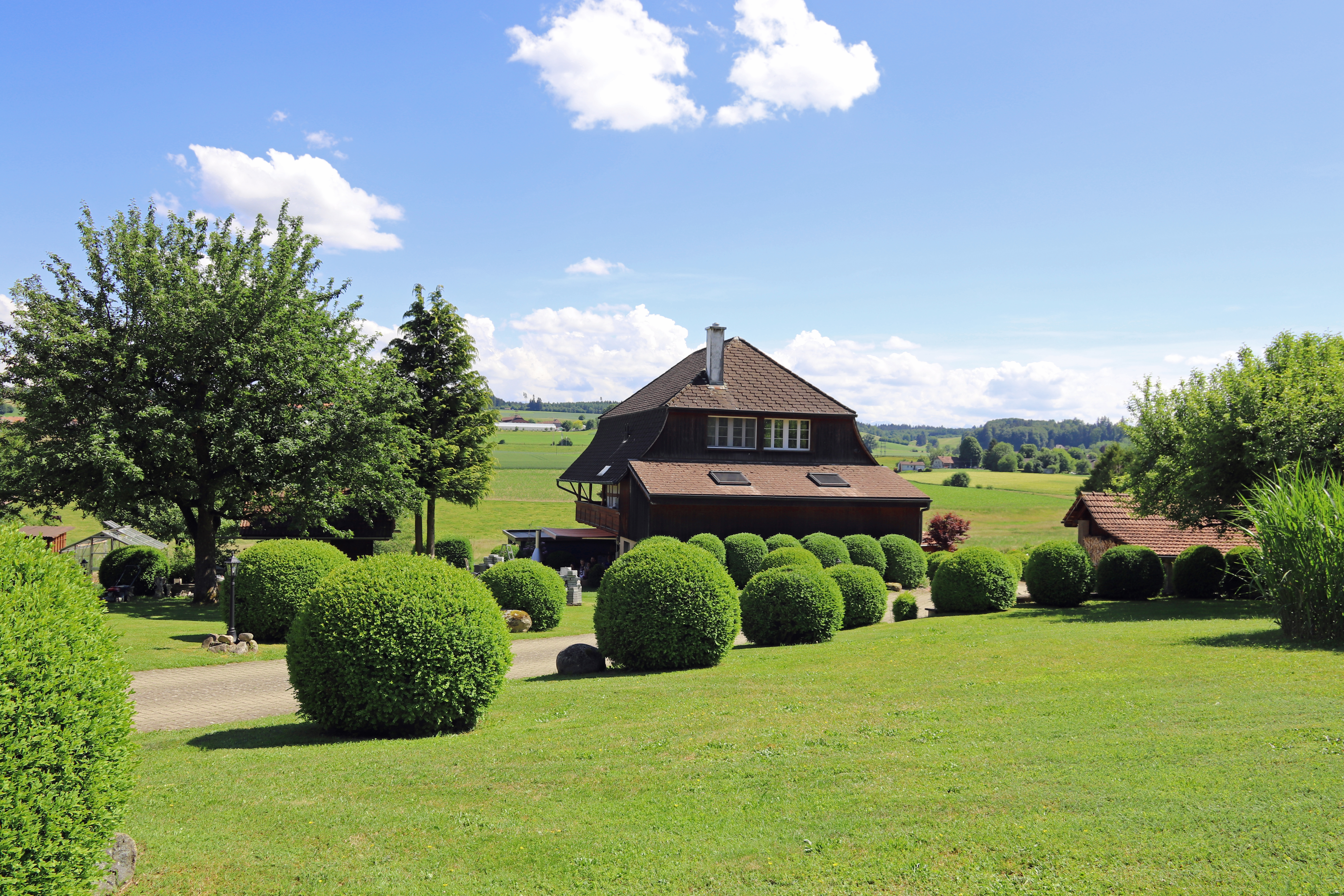 Buchsbäume als Zierpflanzen in Bern-Riedbach.